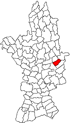 Categorie:Hărţi ale judeţului Olt